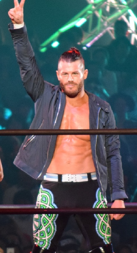 2015年11月7日 大阪府立体育会館 「POWER STRUGGLE」 マット・サイダル